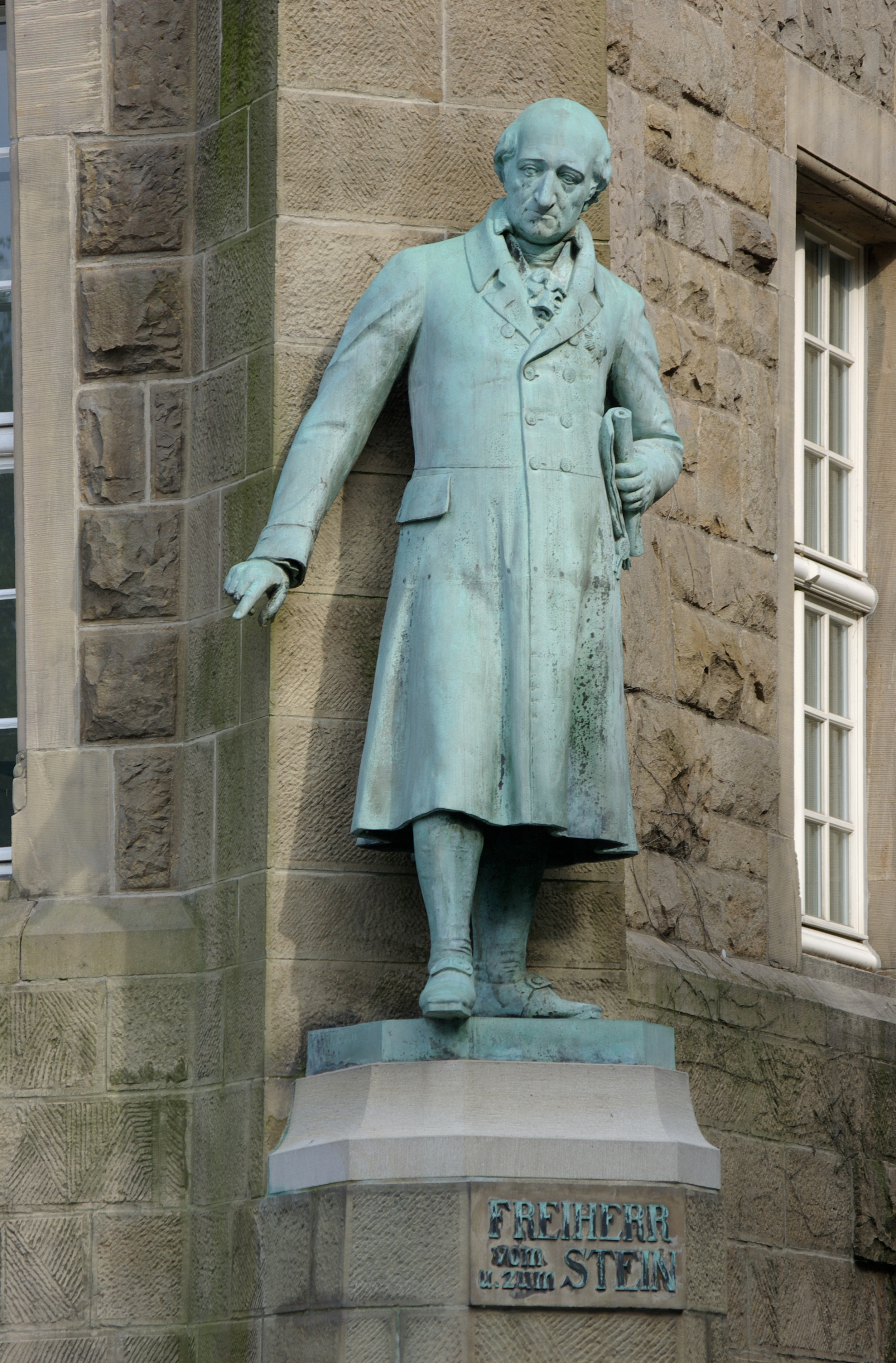 Das Rathaus in Wetter an der Ruhr. Denkmal Freiherr vom und zum Stein.